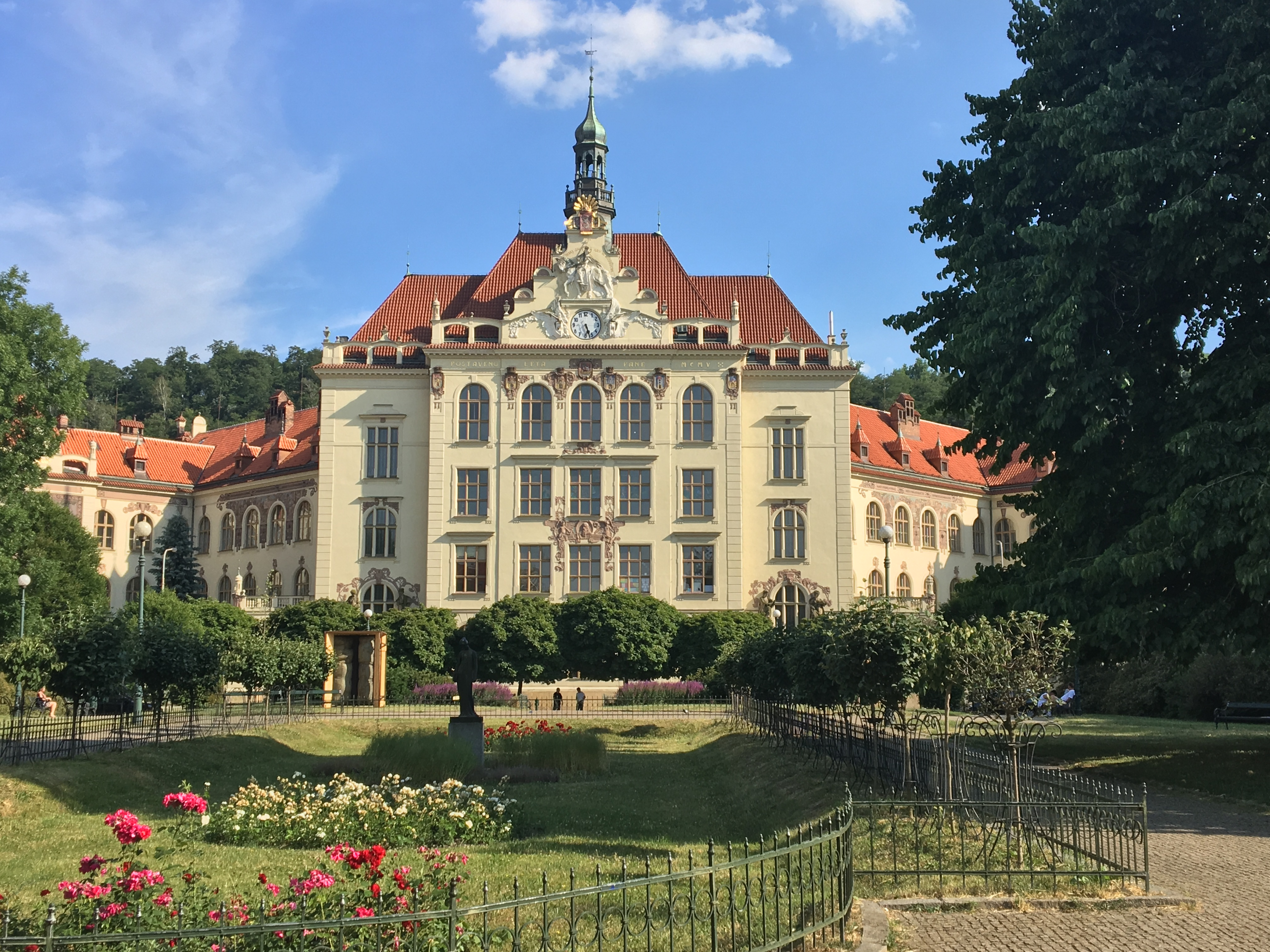 Lyčkovo náměstí v Praze 8-Karlíně, v pozadí základní škola.